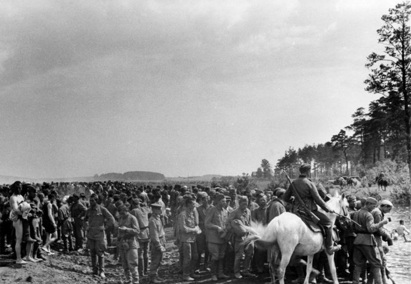 Heeresfilmstelle. Bildarchiv, Bildberichter Weidner Minsk. Weissrussland, 5.7.41, 25.000 russische Gefangene sind in diesem Lager untergebracht, sie werden von berittenen Posten bewacht. Information added by Wikimedia users.